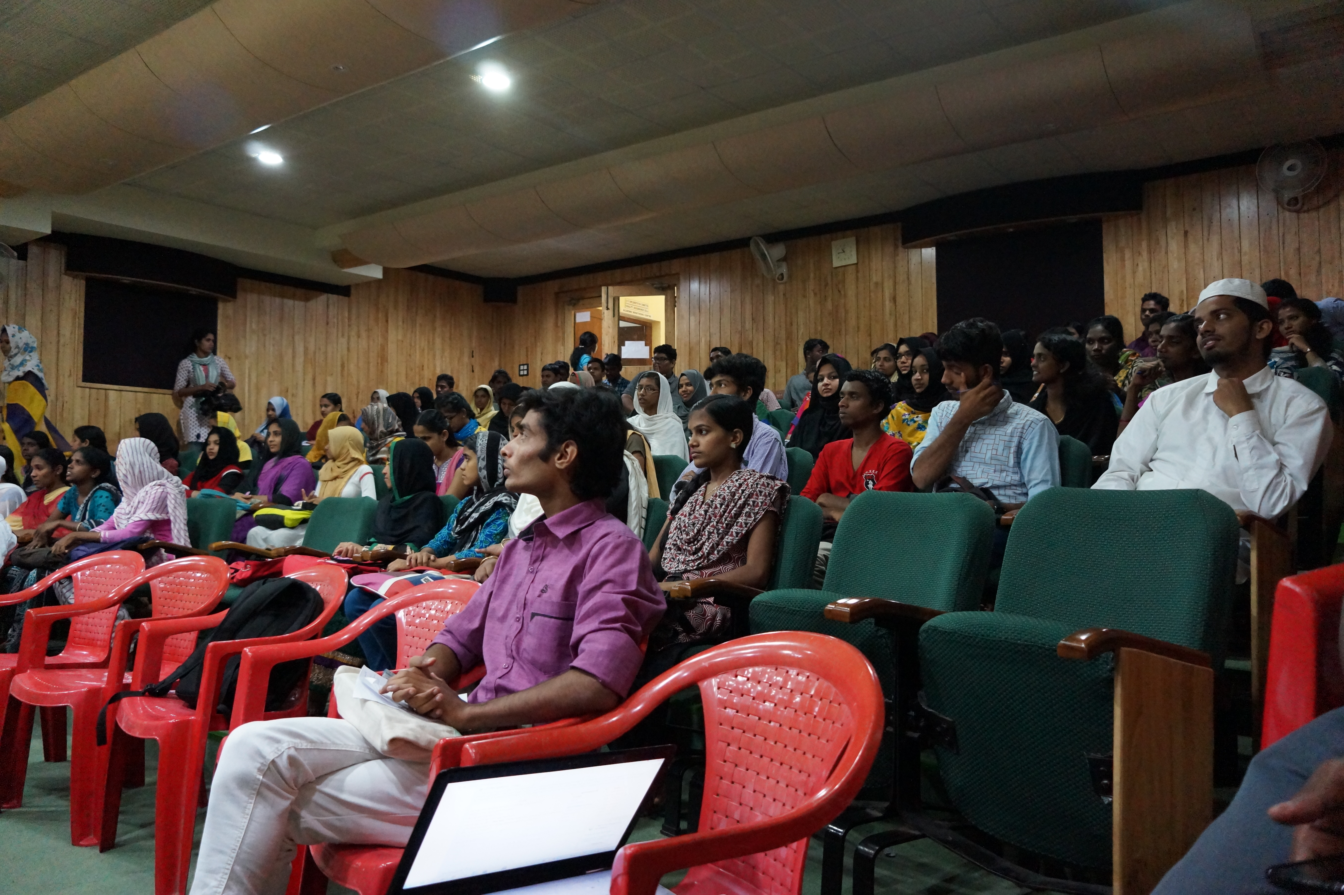 വിക്കി ക്ലാസ്സ് ഫാറൂക്ക് കോളേജ്